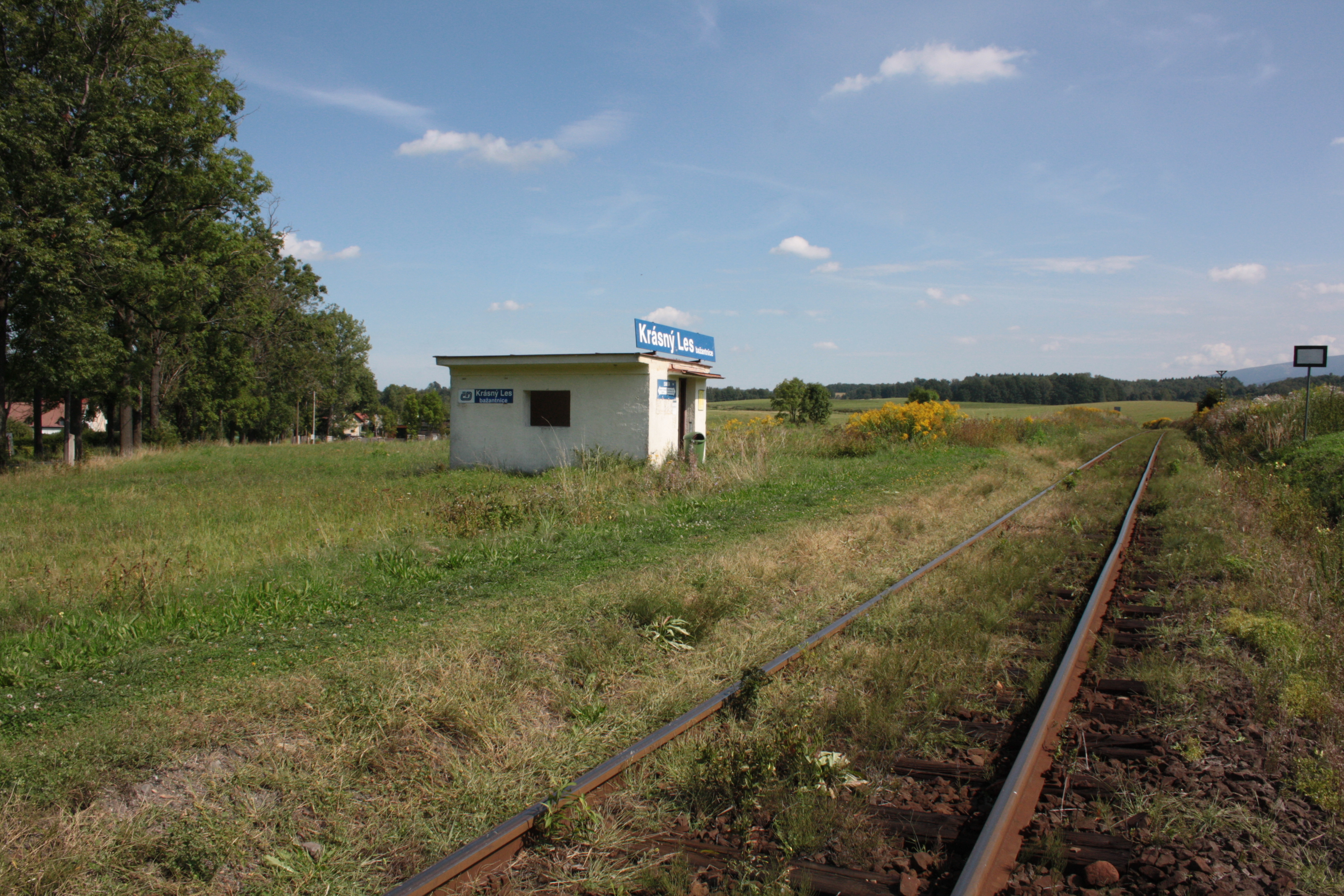 This photograph was taken with a DSLR from WMCZ's Camera grant. Železniční zastávka Krásný Les bažantnice (pohled od západu).